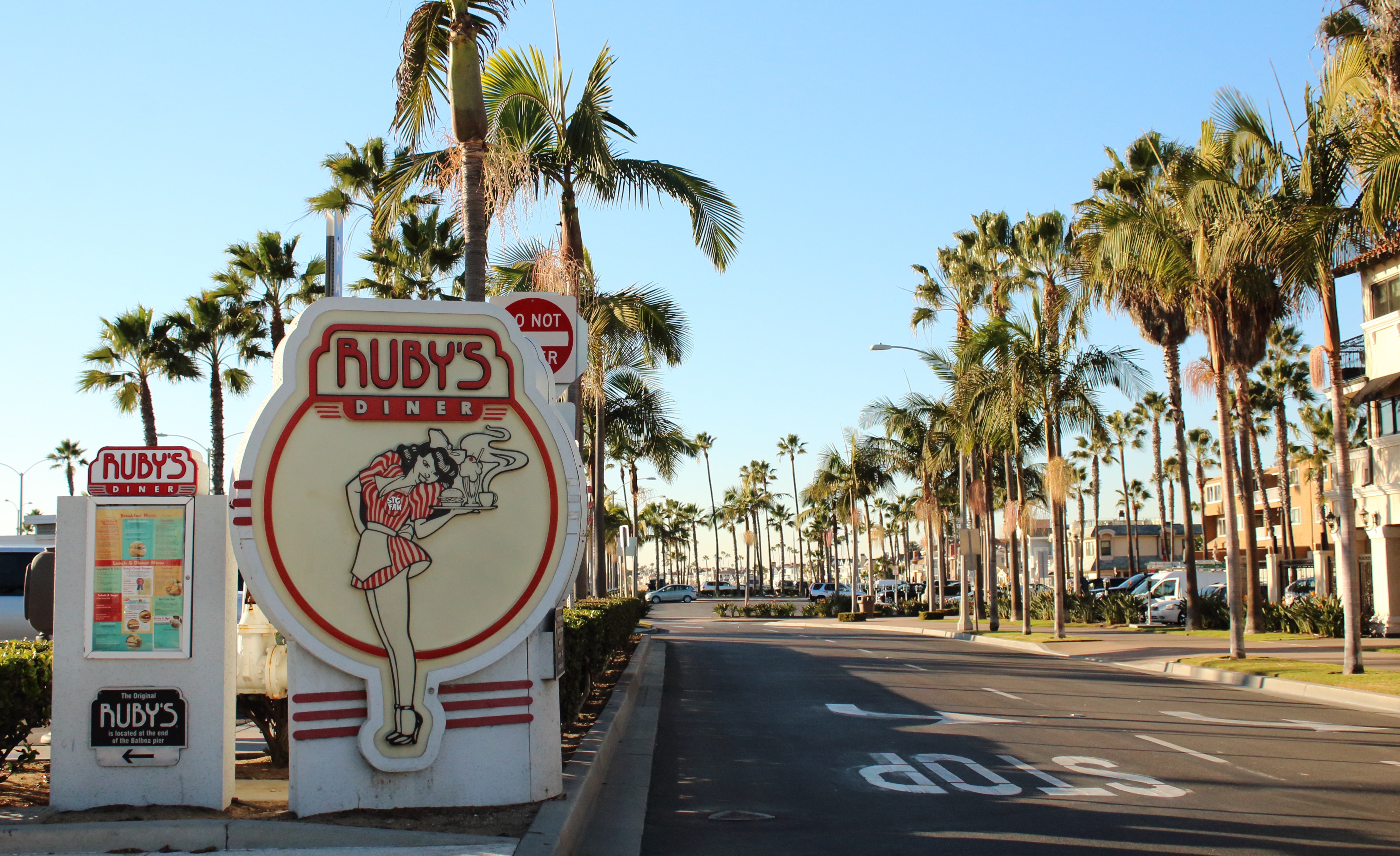 Ruby's dinner en Newport Beach.